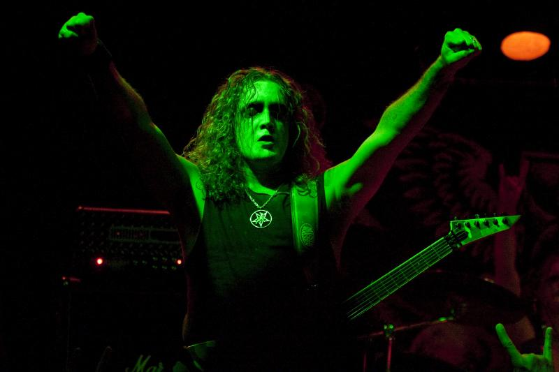 Marduk live at Hangar 110 - 16/04/2010 - São Paulo, Brasil.